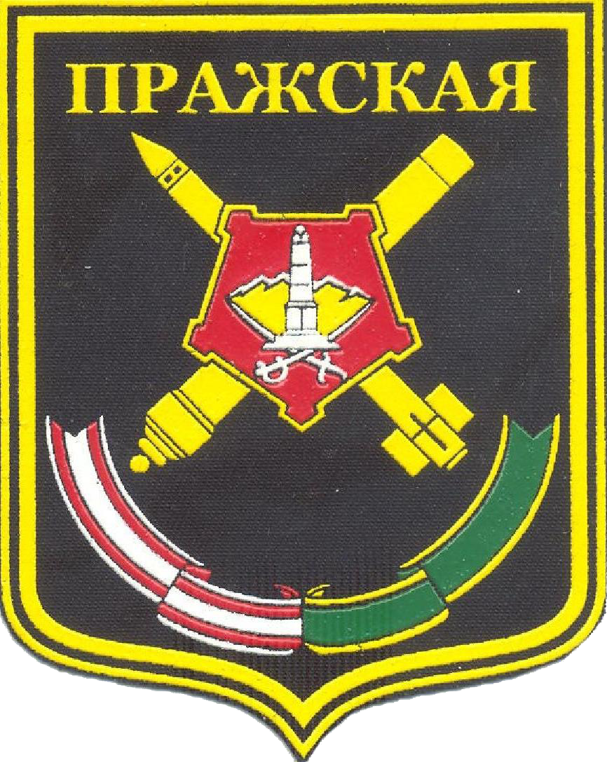 Нарукавный знак 232-й РеАБр (Чебаркуль)